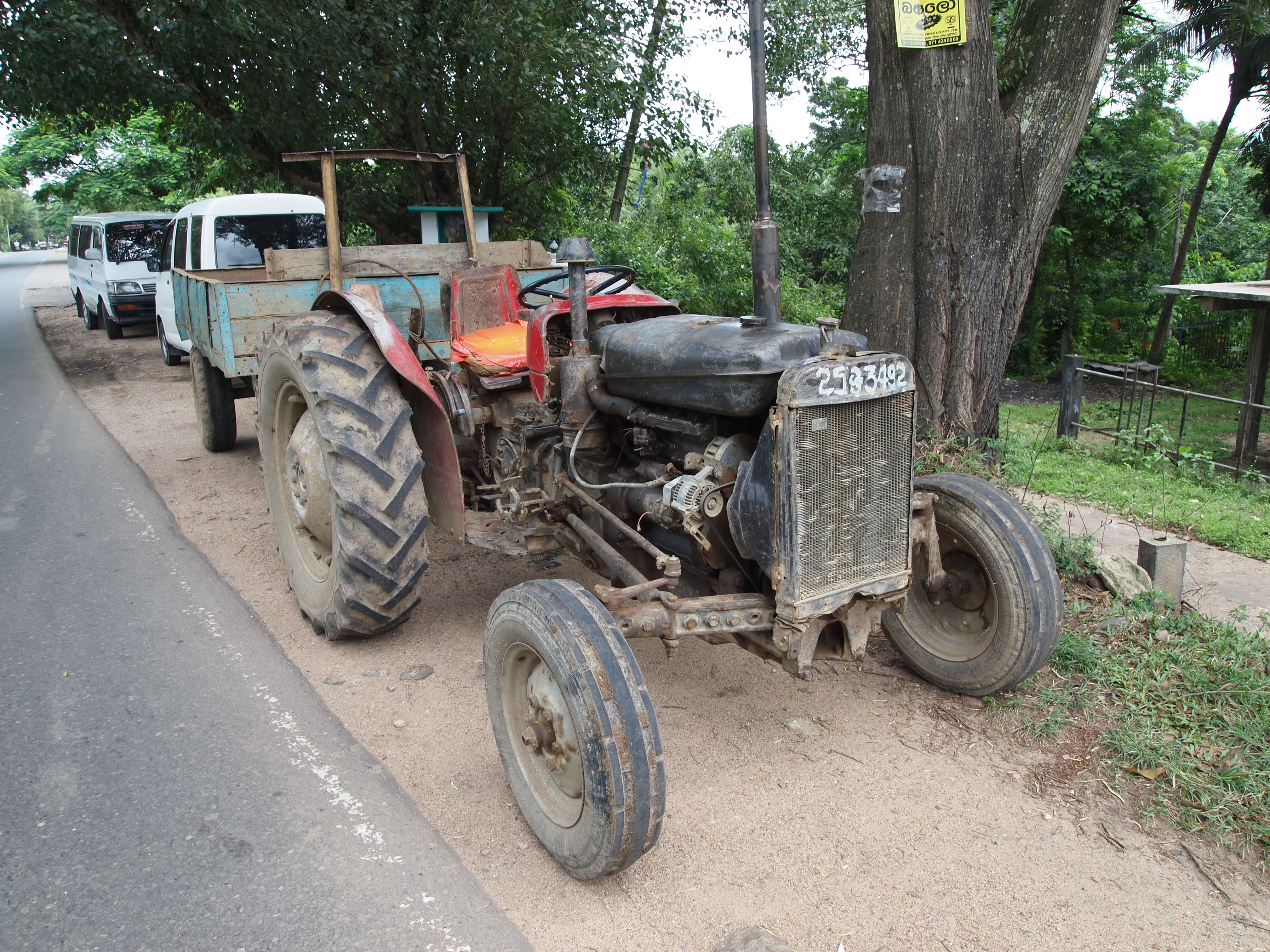 பாதையோரத்தில் நிறுத்தி வைக்கப்பட்டிருக்கும் பழைய உழவு இயந்திரம்